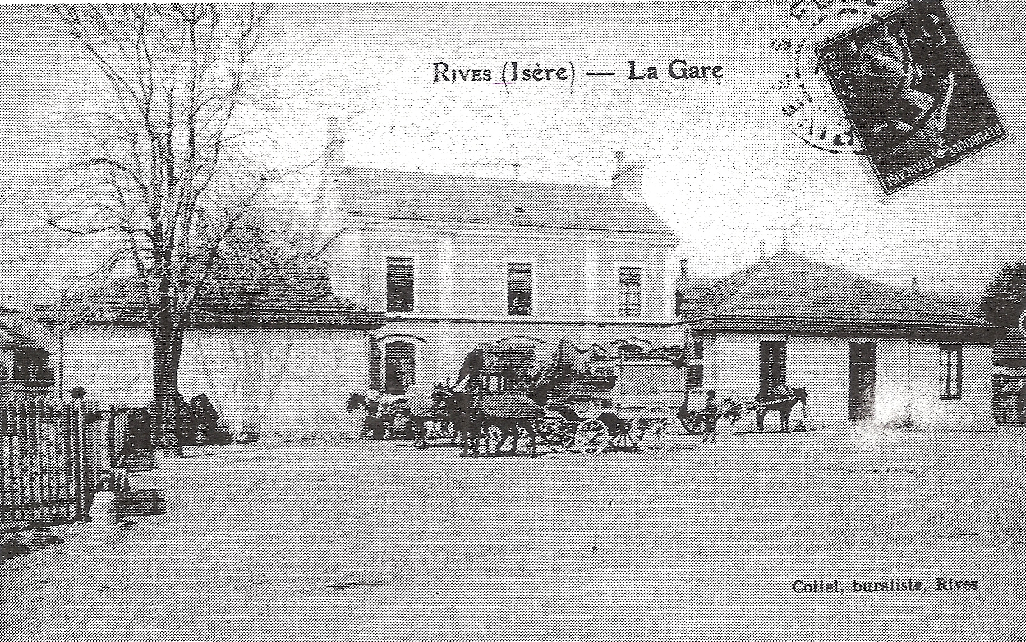 La gare de Rives au début du XX° siècle./ Rives, Isère, France